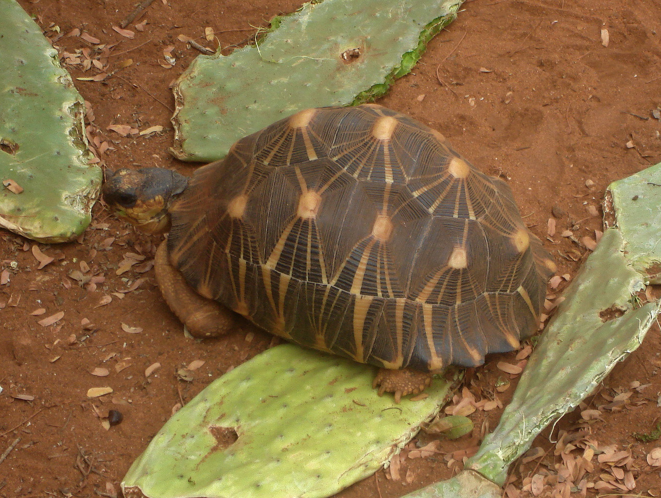 Geochelone radiata. Radiated tortoise